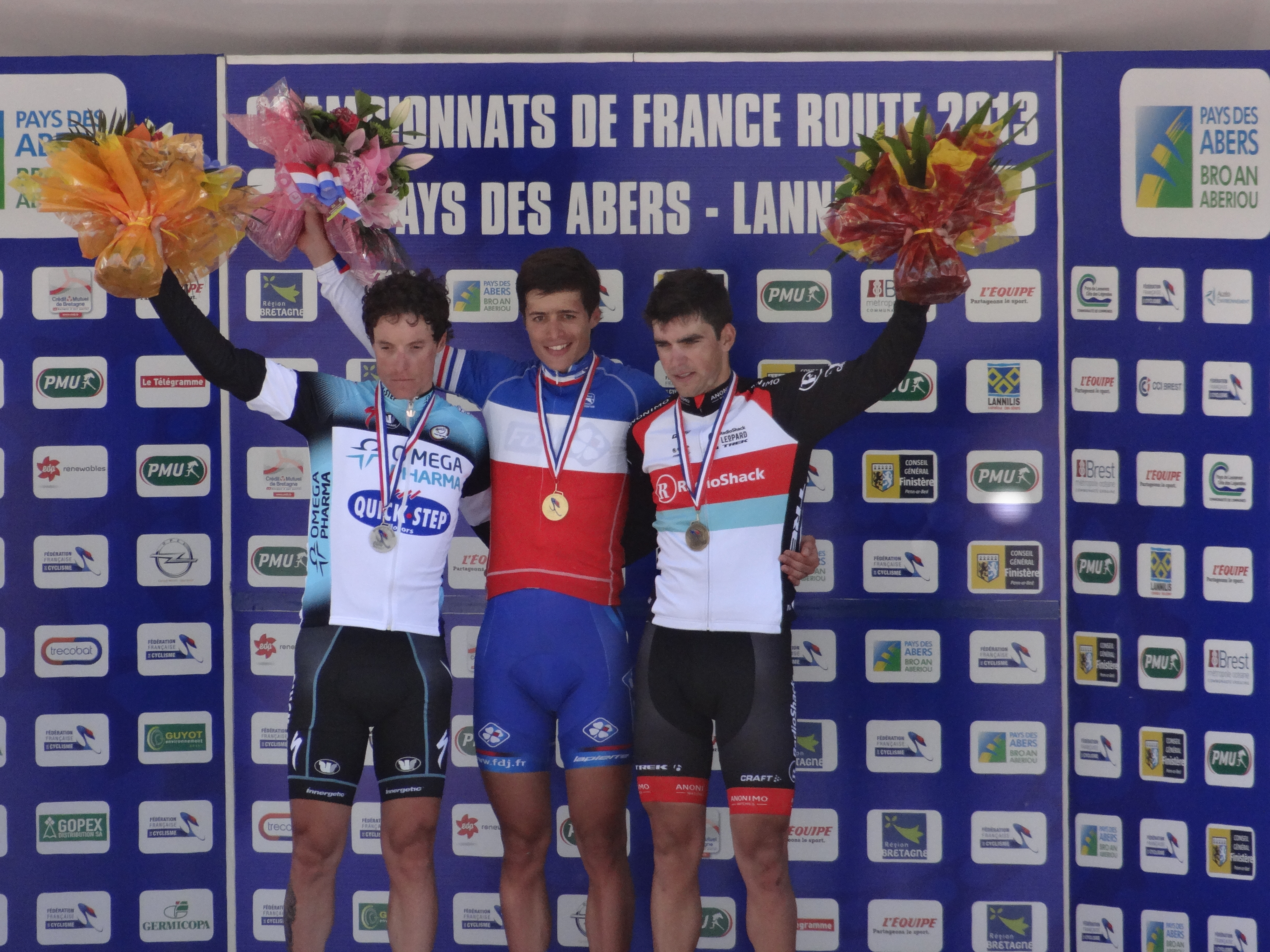 Championnat de France de cyclisme sur route 2013 à Lannilis : podium : 1er : Arthur Vichot (au centre) 2nd : Sylvain Chavanel (à gauche) 3e : Tony Gallopin (à droite)